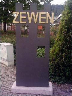 Begrüßungsschild am Ortseingang von Zewen